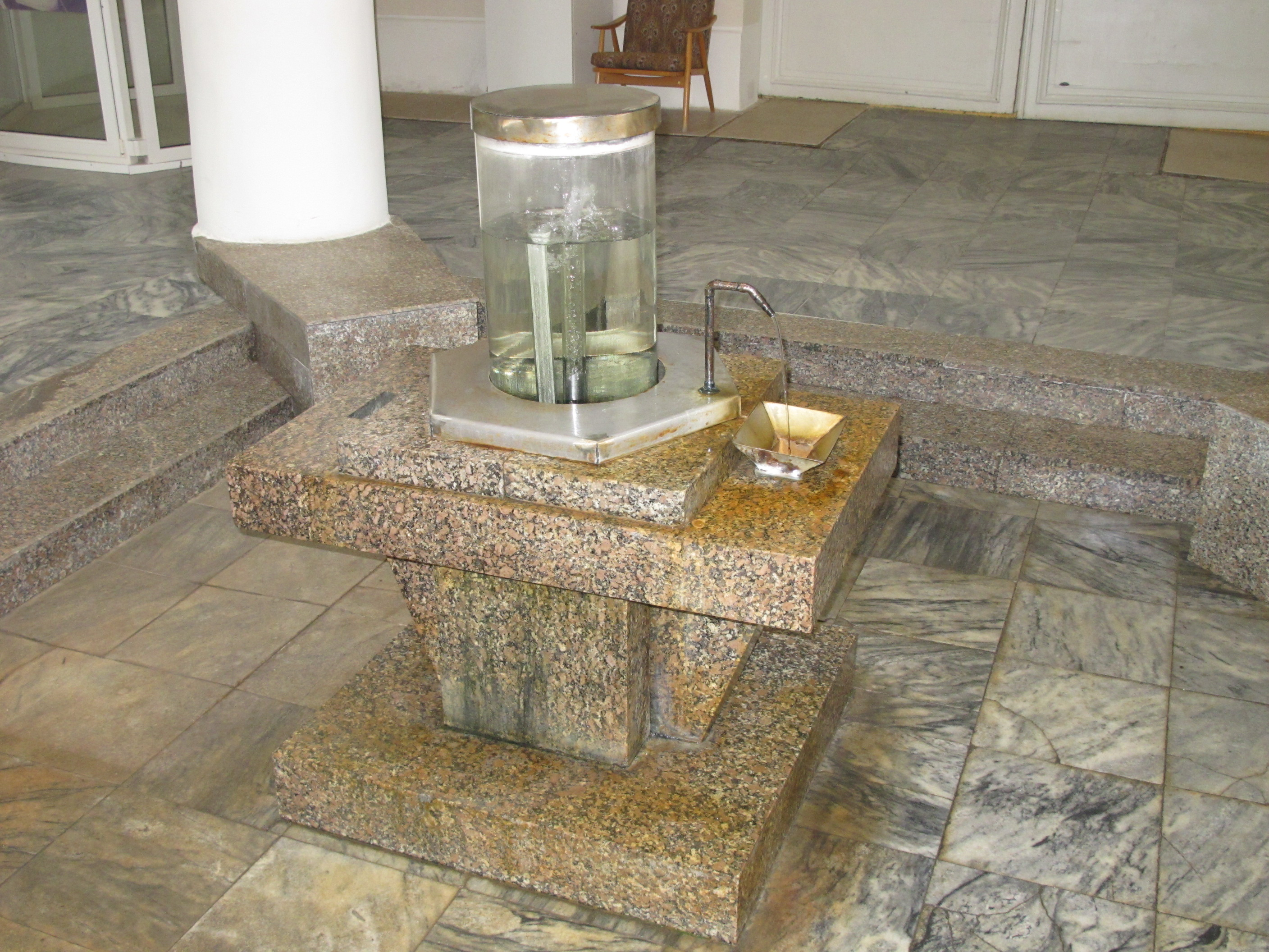 Quelle in Franzensbad